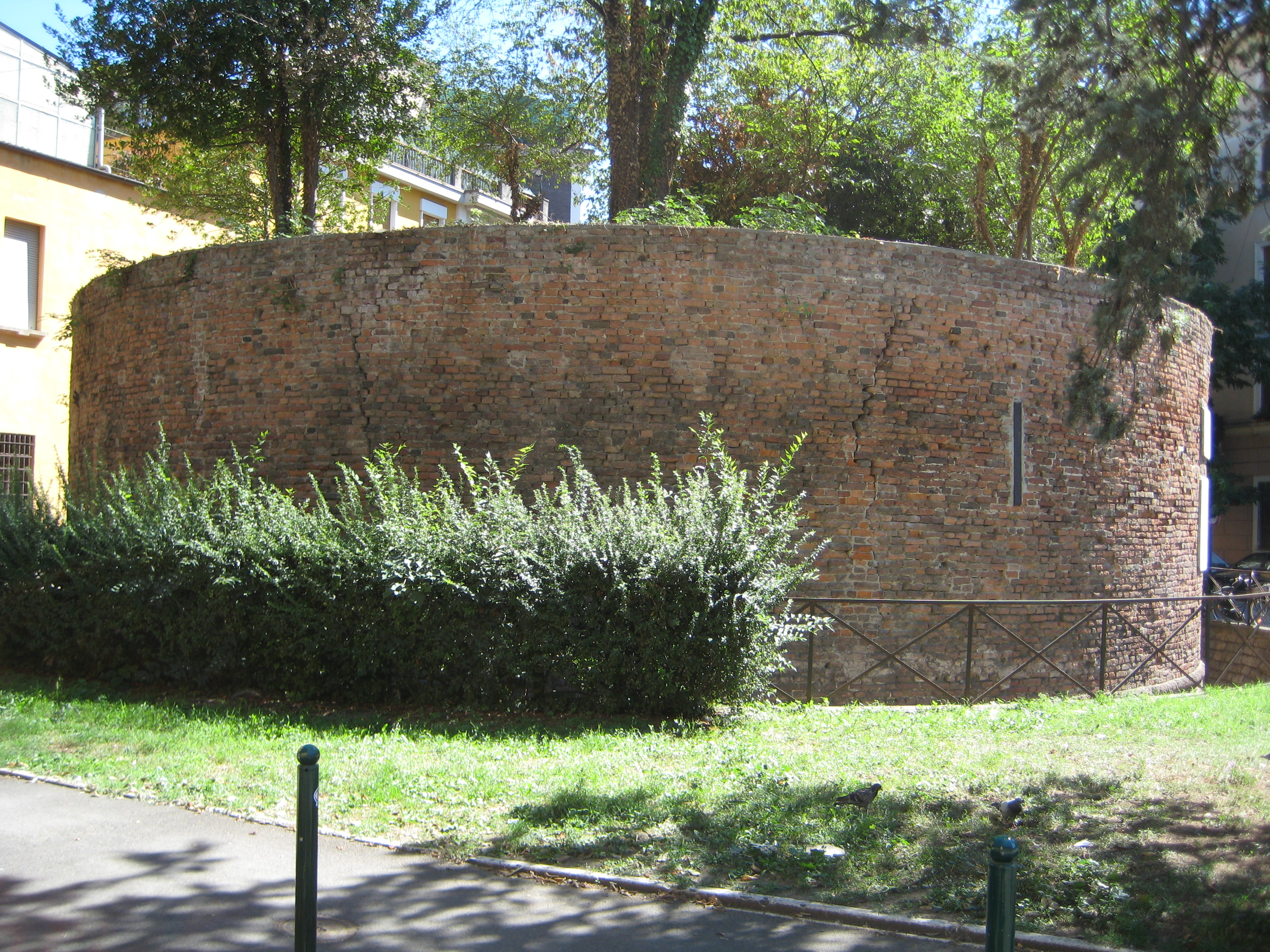 Vestige du château de Sainte-Croix (Crémone)